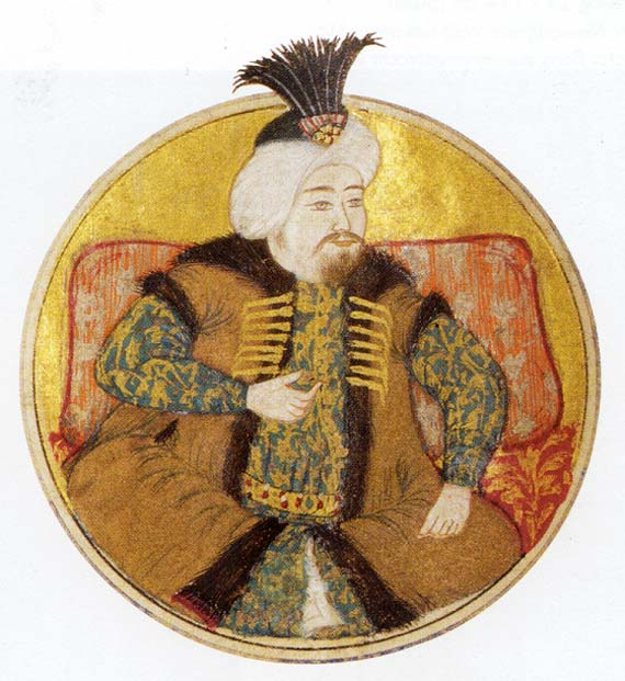 Sultan Mustafa II. Ottoman miniature painting, located at Topkapı Sarayı Müzesi, Istanbul (Inv. A 3110, Fol. 17r)